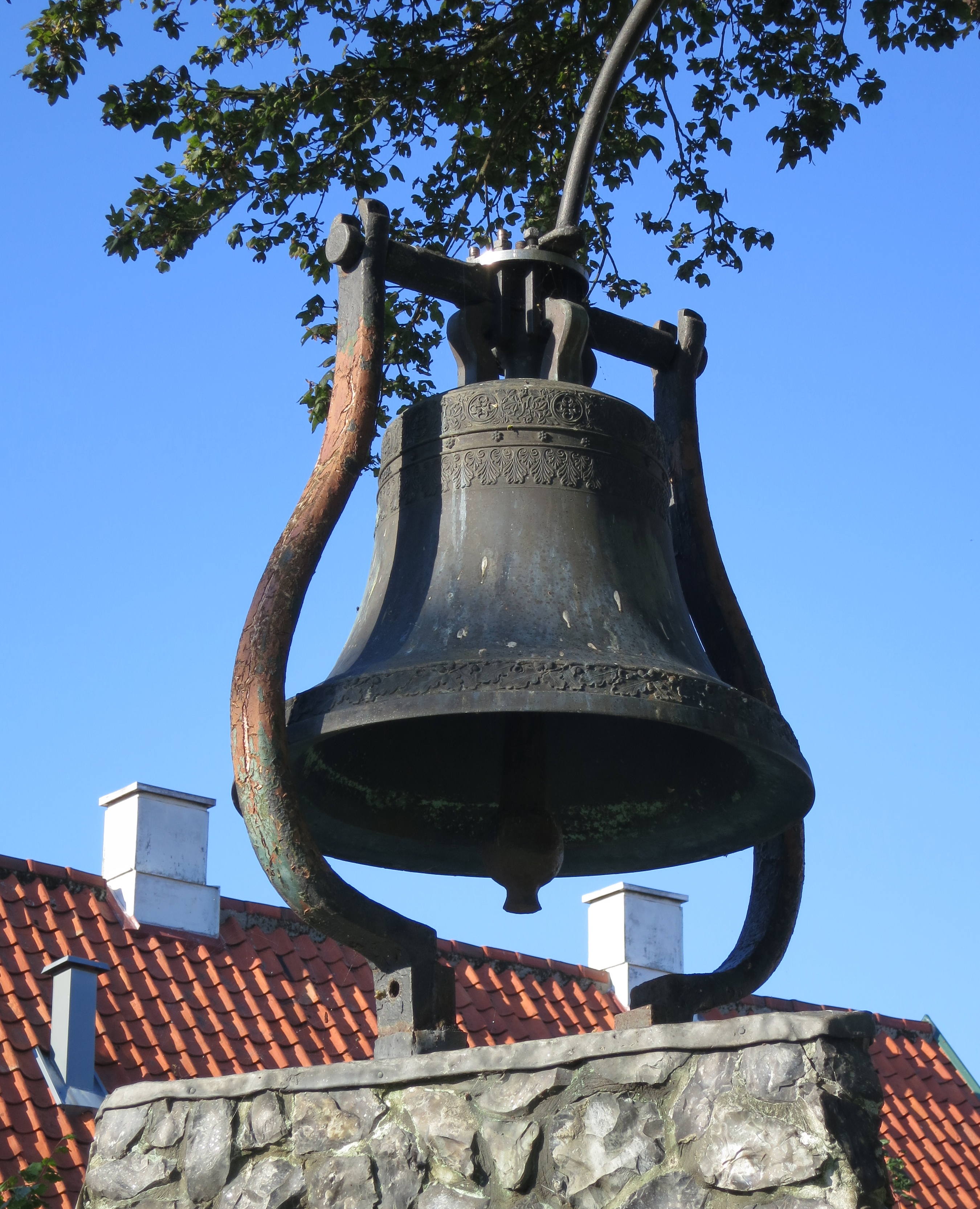 Knutsklockan på Rådhustorget i Skanör